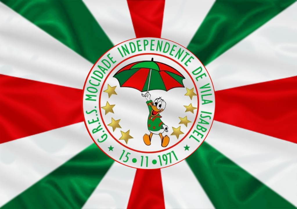 Mocidade Independente de Vila Isabel pavilhão